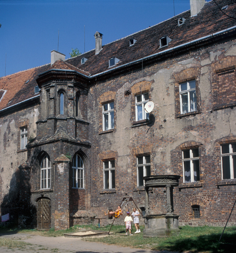 Namysłów